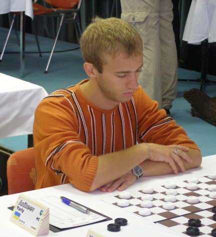 Juri Anikejev Pic by Ahsoous 2006-09-10